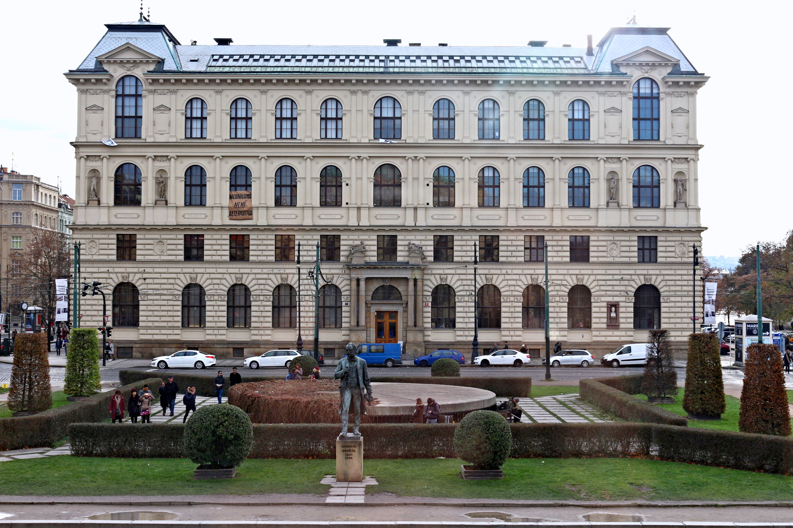 Vysoká škola uměleckoprůmyslová v Praze